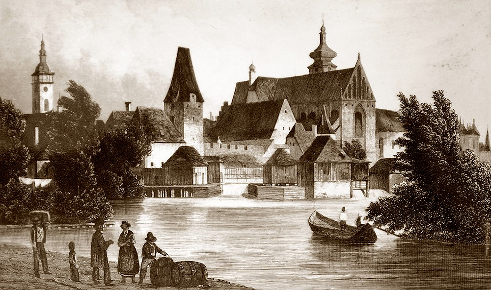 Rybářská brána, solnice, střecha Polygonální bašty, štít kostela Obětování Panny Marie